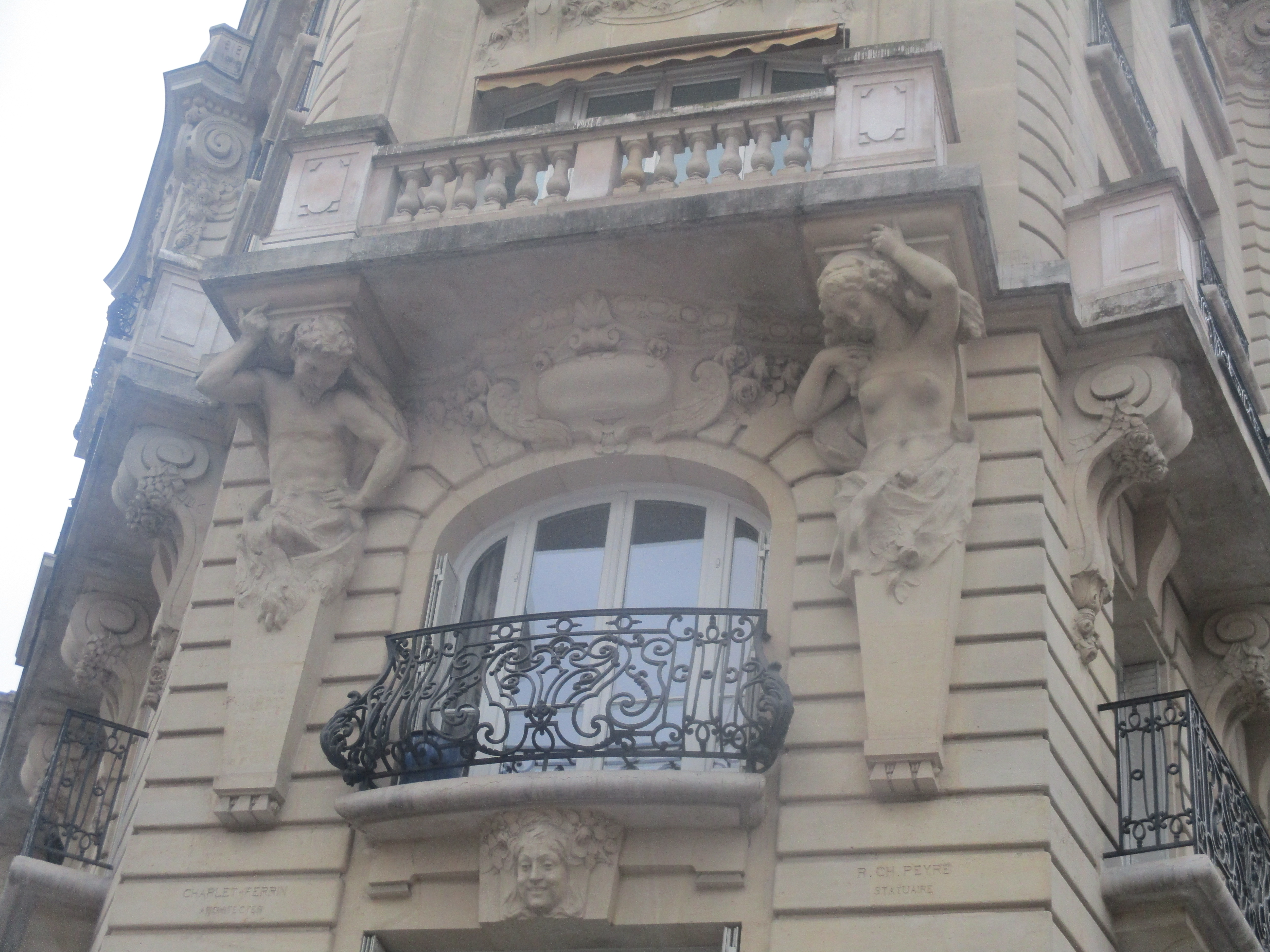 Angle de la rue Abel et de l'avenue Daumesnil (Paris XIIe). Consoles en atlante et cariatide. 30bis avenue Daumesnil.